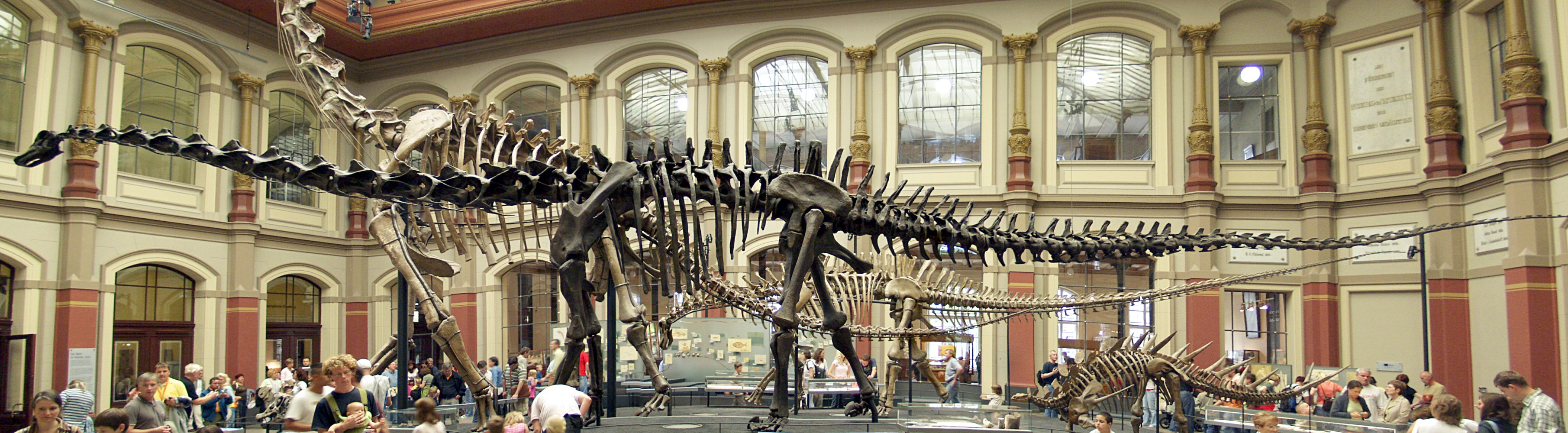 Skelett eines Diplodocus in der Dinosaurierhalle des Museums für Naturkunde, Berlin. Museum of Natural History Berlin Native nameMuseum für NaturkundeParent institutionBürger schaffen WissenLocationBerlinCoordinates52° 31′ 48.72″ N, 13° 22′ 45.12″ E Established1889Web page control : Q233098 VIAF: 146620974 ISNI: 0000 0001 2293 9957 LCCN: n83179862 GND: 37657-7 SUDOC: 063871335 WorldCat institution QS:P195,Q233098